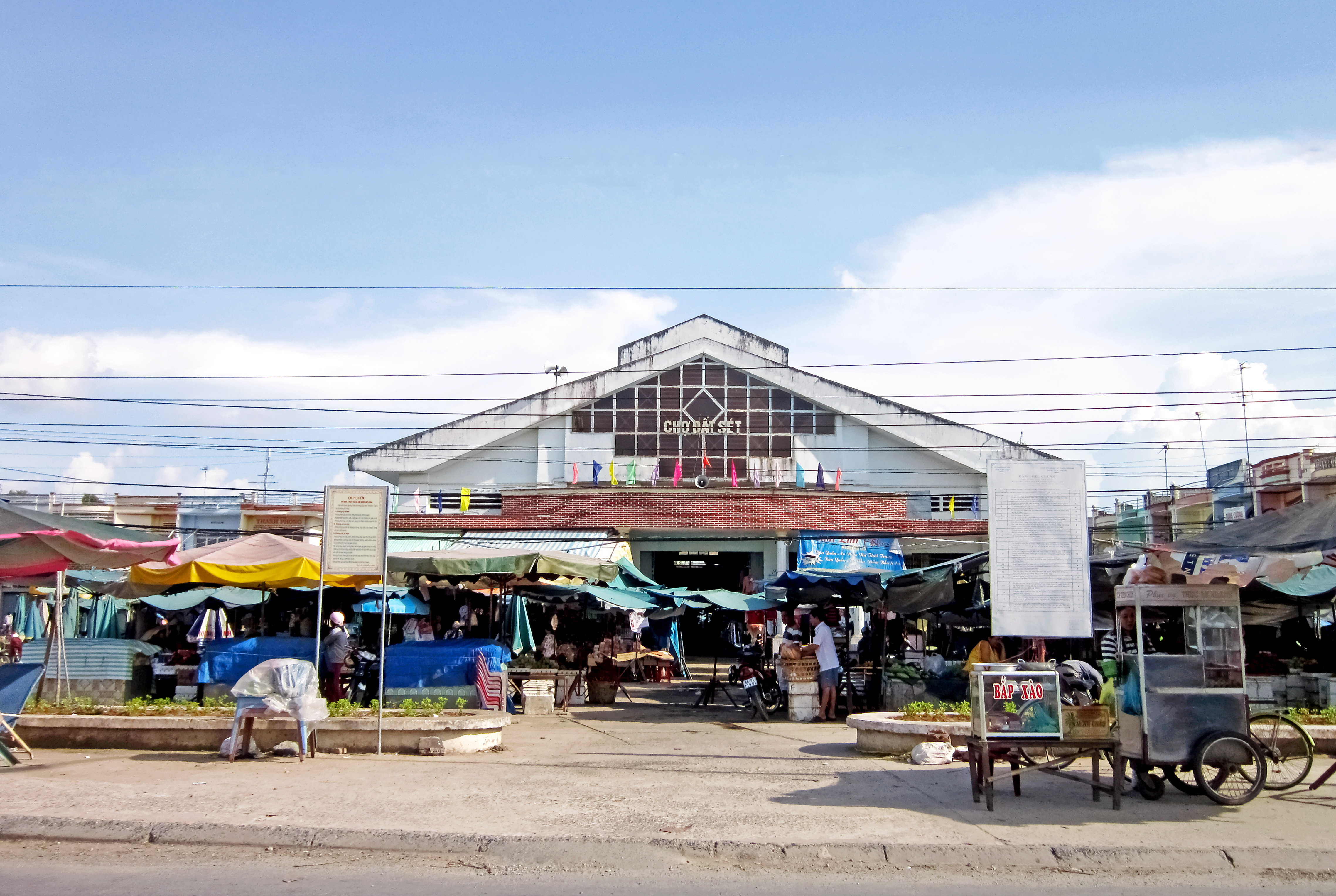 Chợ Đất Sét là chợ lớn nhất ở xã Mỹ An Hưng B, thuộc huyện Lấp Vò, tỉnh Đồng Tháp, Việt Nam.